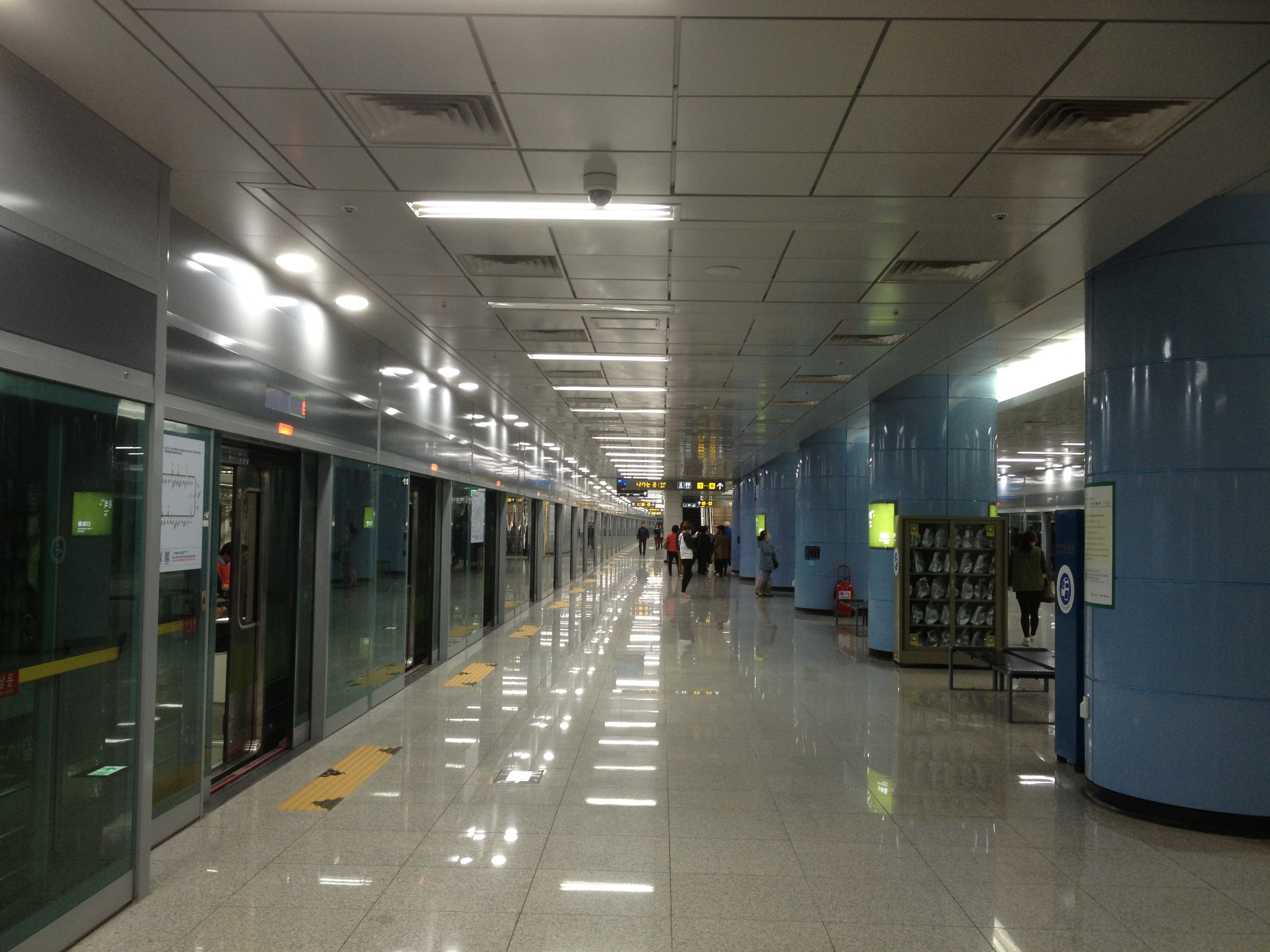 서울특별시도시철도공사 7호선 춘의역 홈